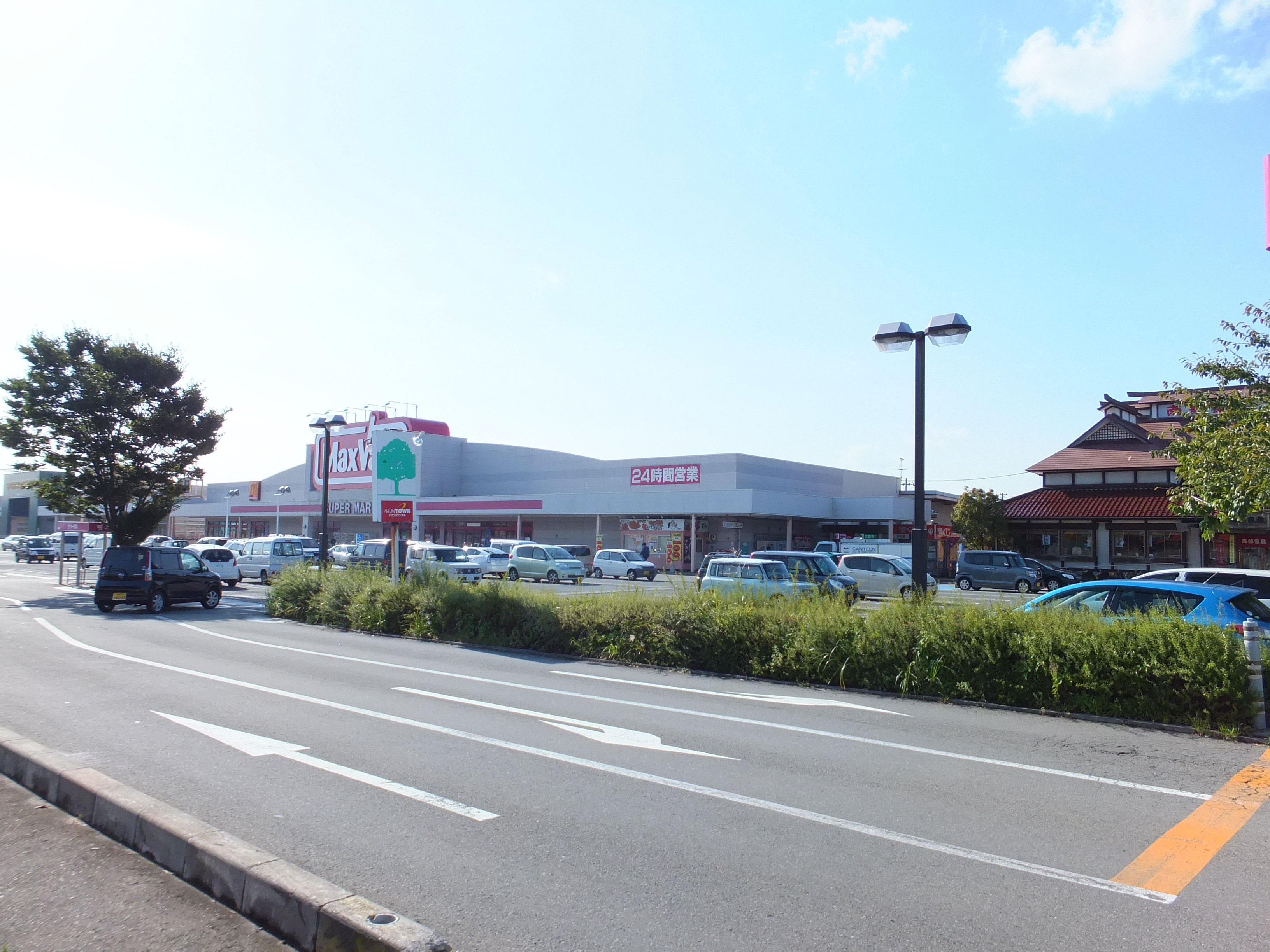 イオンタウン茨島パワーセンター（秋田市茨島）